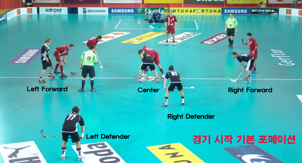 플로어볼 경기 시작 포메이션